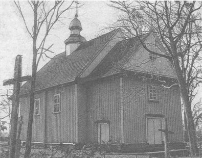 Беларуская (тарашкевіца): Войская (Vojskaja). Траецкая царква